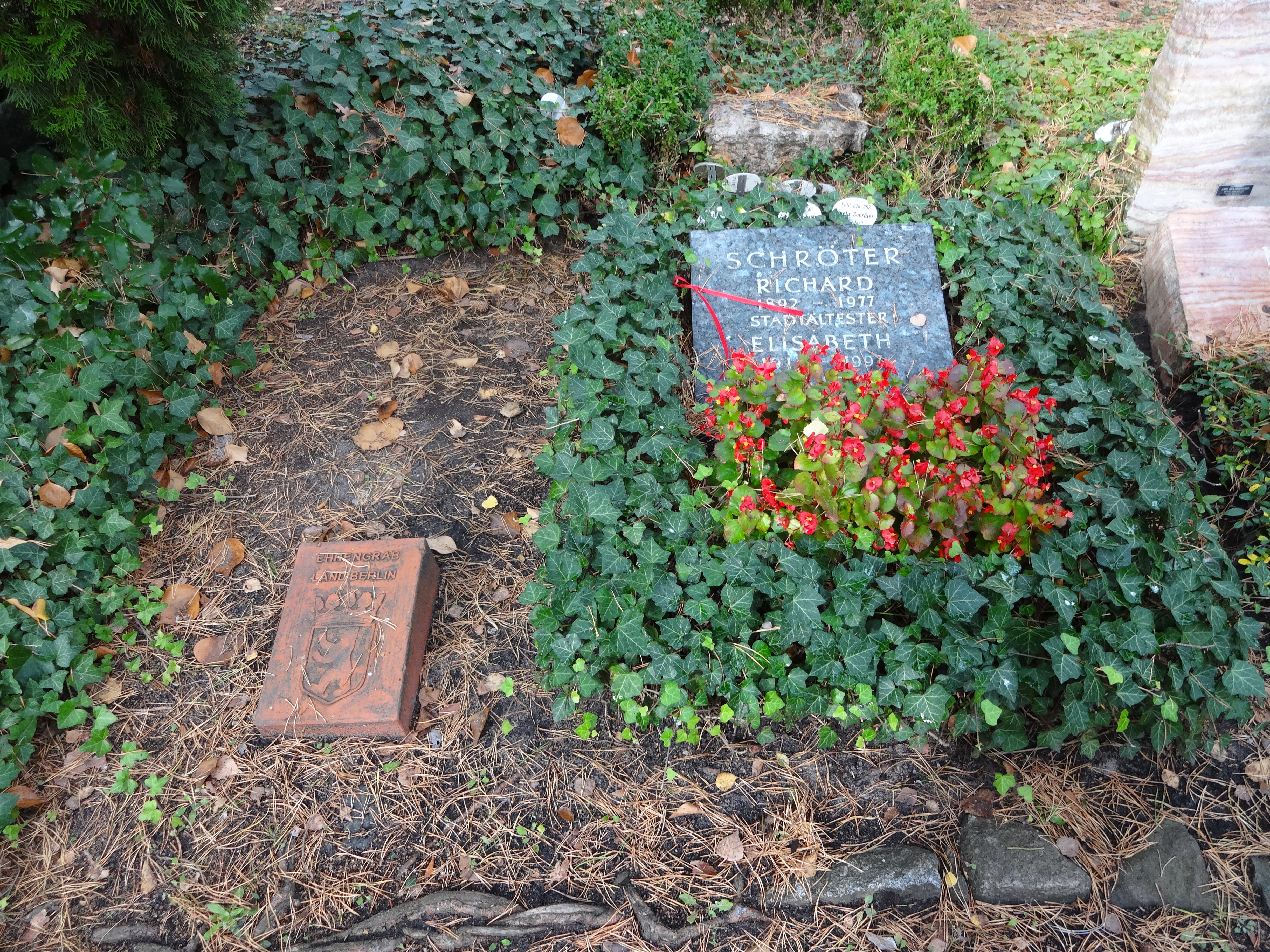 Grab von Richard Schröter auf dem Waldfriedhof Zehlendorf, Ehrengrab